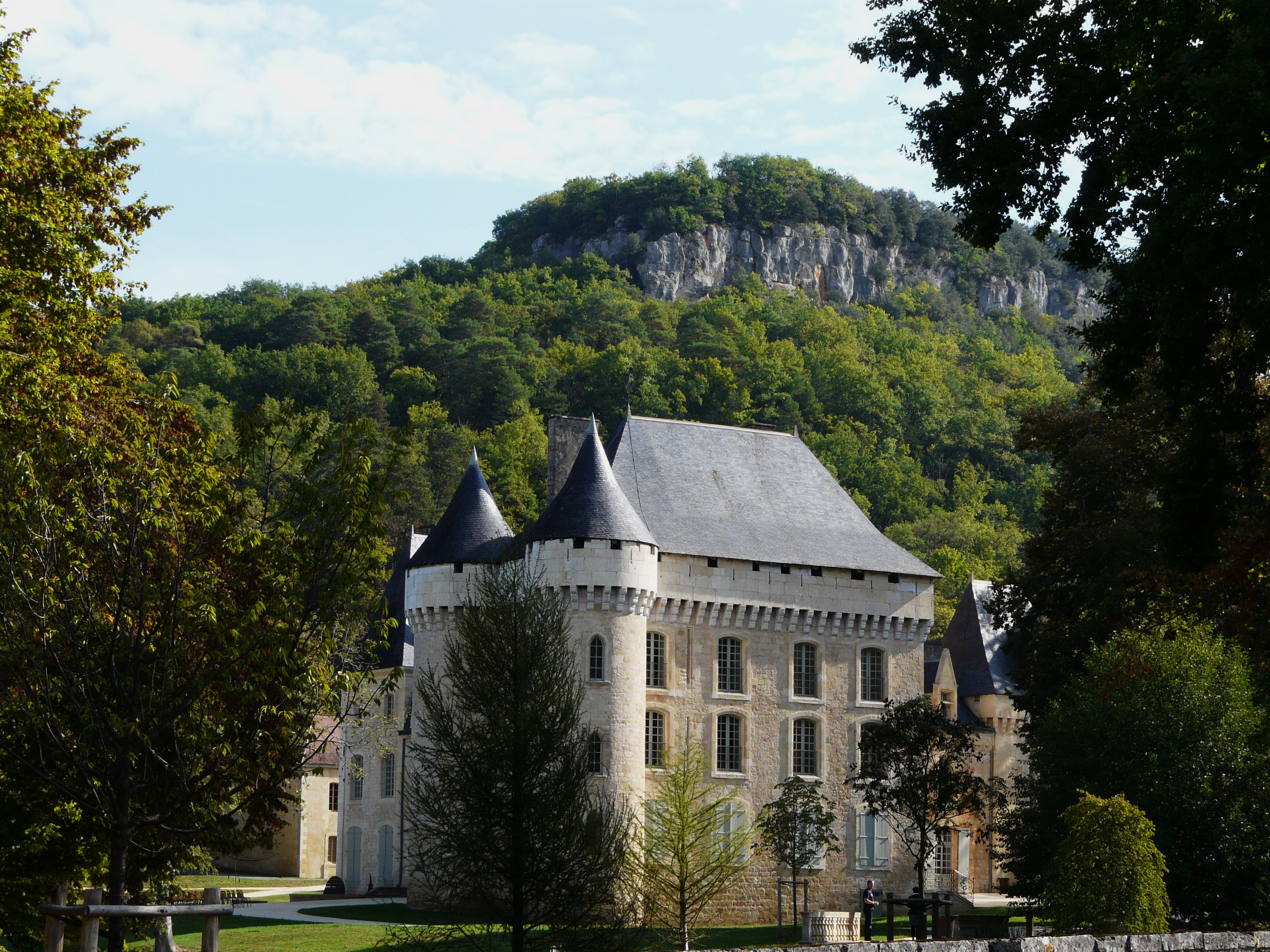 Le château de Campagne, Dordogne, France. Vue prise depuis le sud-ouest.